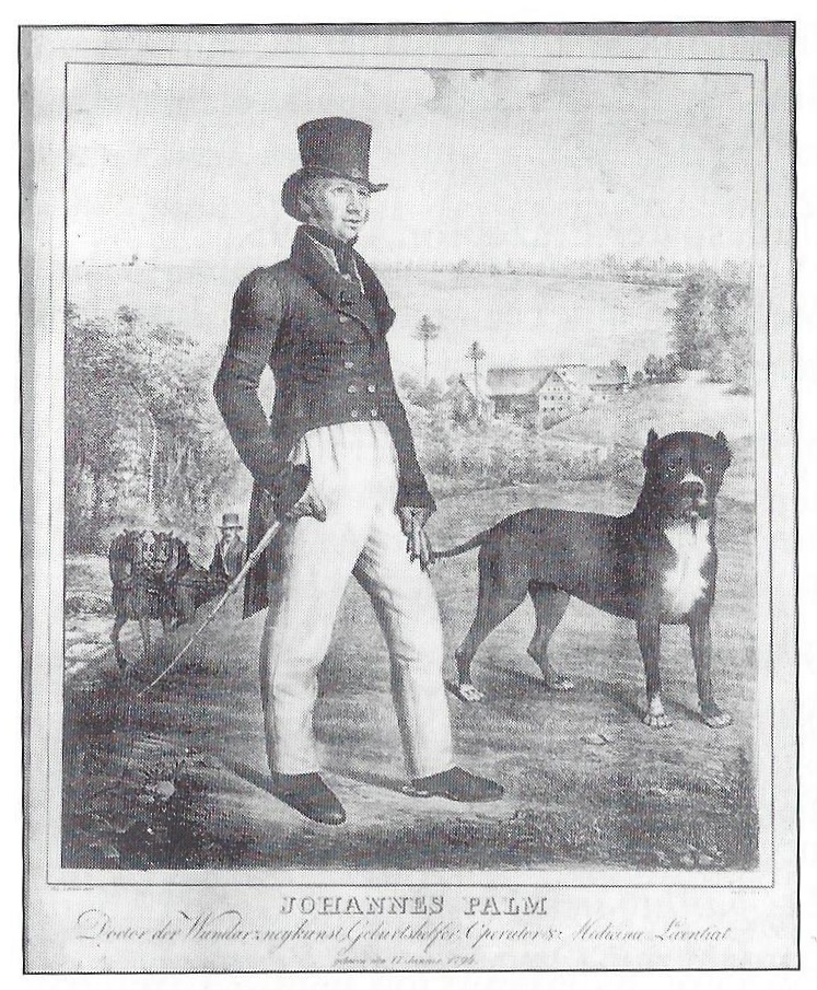 Lithographie des Chirurgen Johannes Palm